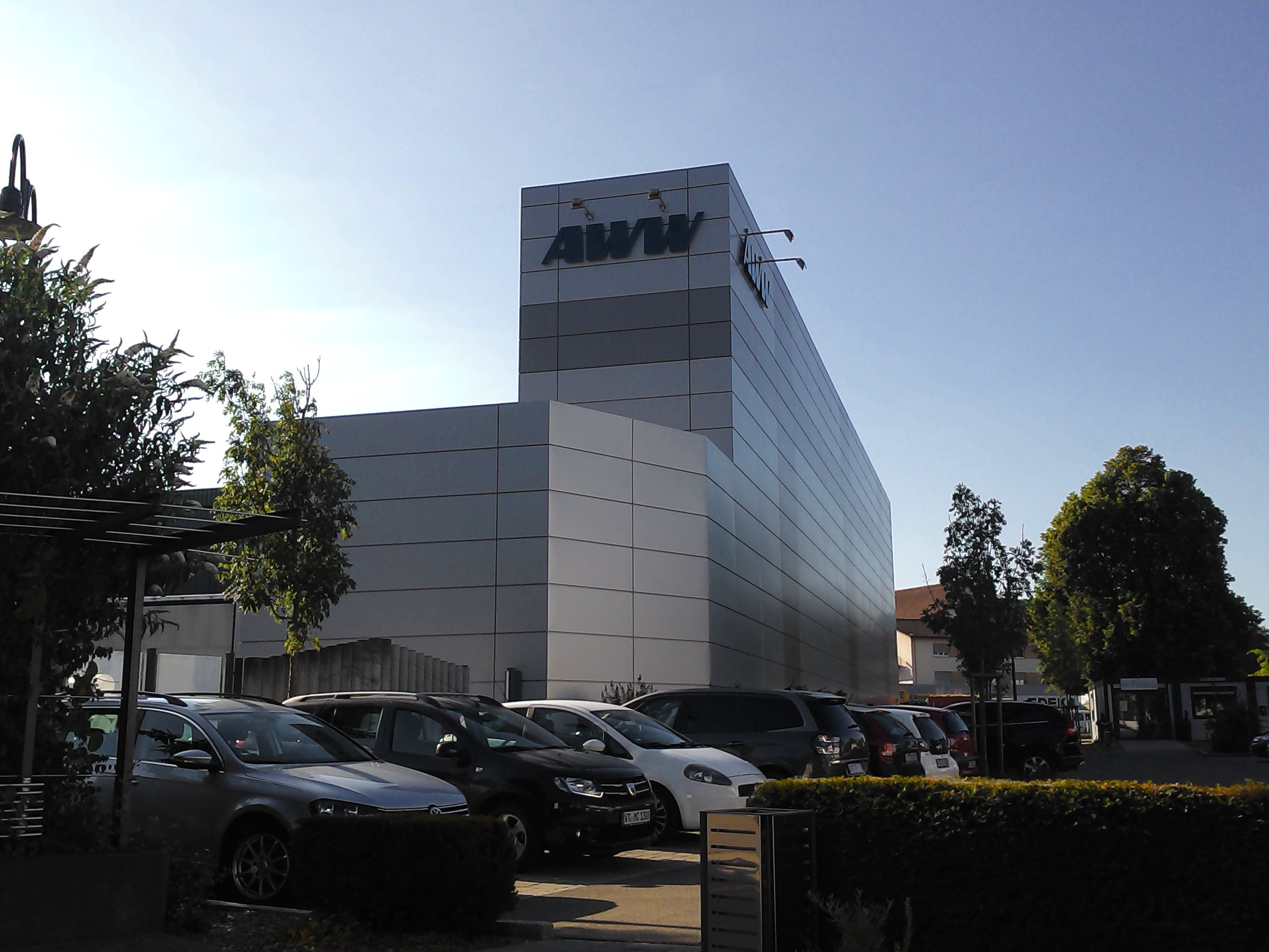 Wutöschingen (Gemeinde) im Landkreis Waldshut, Baden-Württemberg. Aluminiumwerke Wutöschingen (AWW)